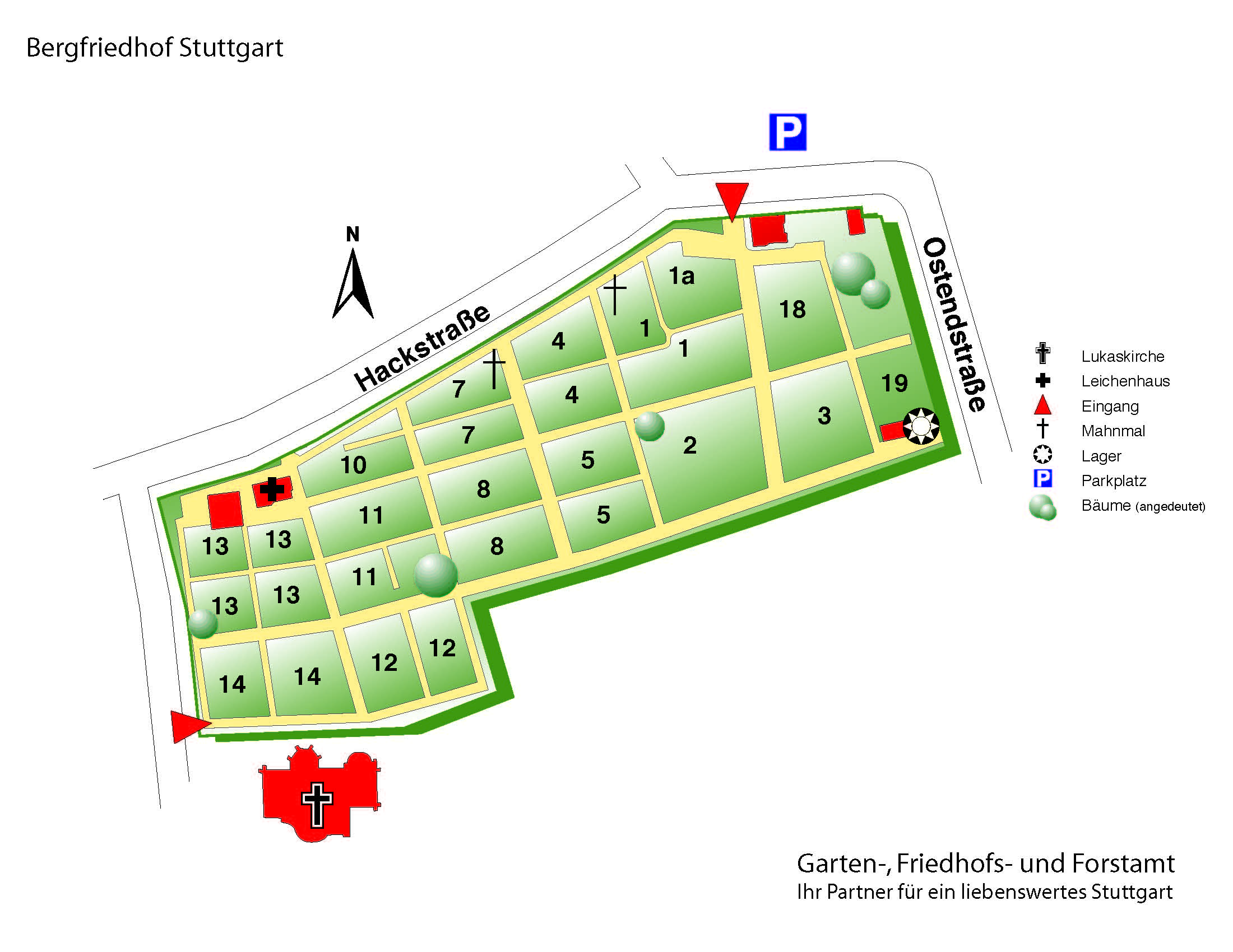 Plan des Bergfriedhofs in Stuttgart.